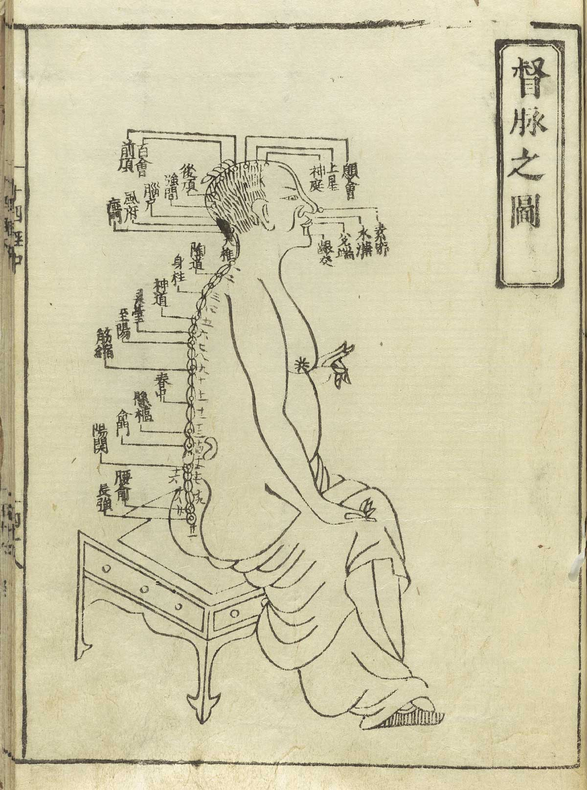 A imagem faz parte de um livro disponível em: A Wikipédia em inglês usa outra imagem da mesma fonte, Com a seguinte indicação: Hua Shou. Expression of the fourteen meridians. (Tokyo, 1716). Licensing: This image is in the public domain because its copyright has expired in the United States and those countries with a copyright term of life of the author plus 100 years or less.